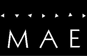 Logo of Museu de Arqueologia e Etnologia da USP.